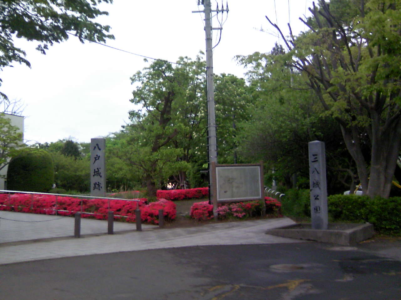 三八城公園・入り口（八戸市内丸） (UCHIMARU, HACHINOHE, AOMORI, JAPAN)